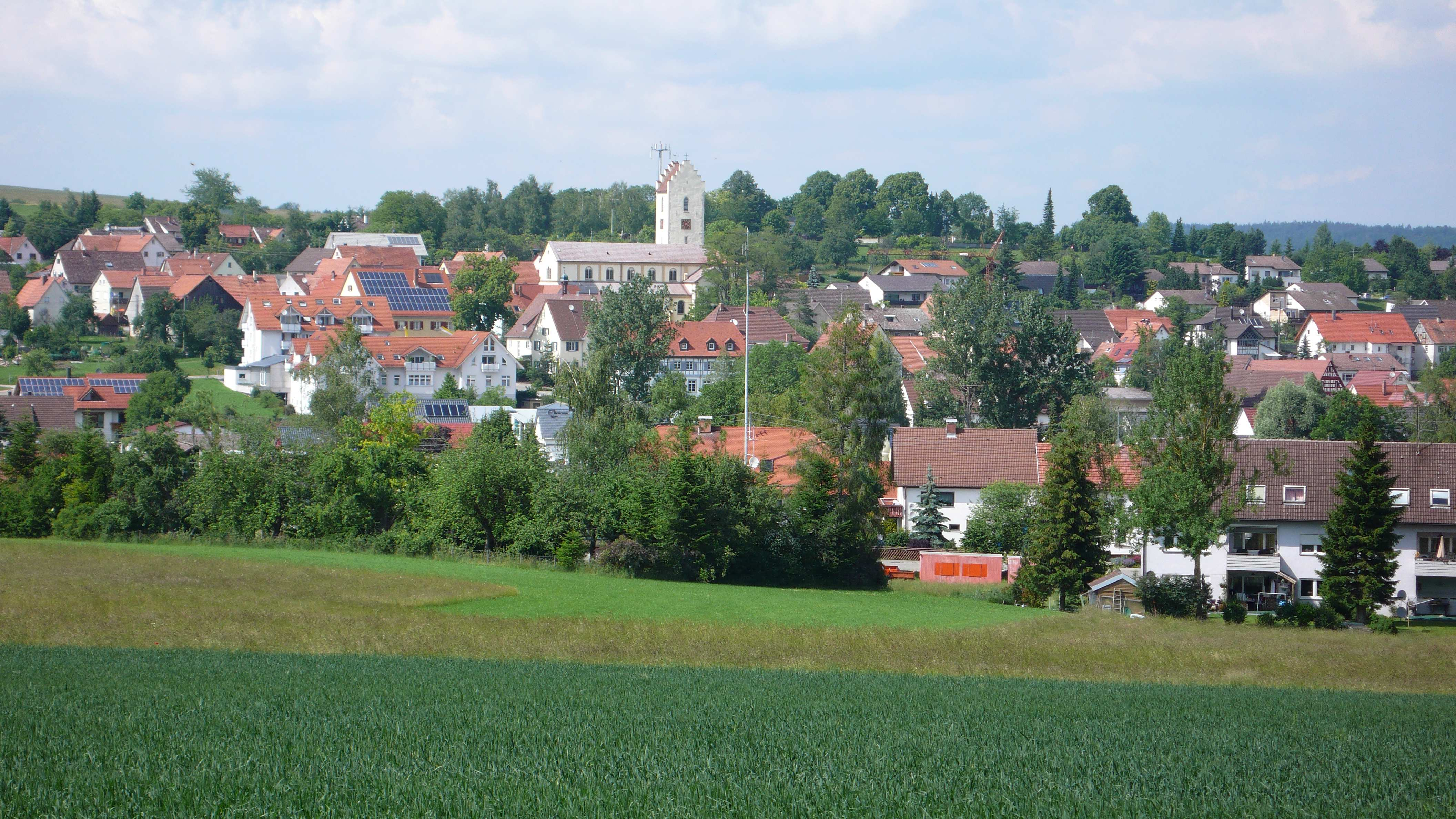 Emmingen, Baden-Württemberg, Germany